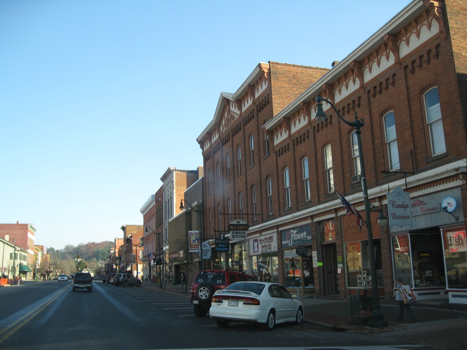 Brookville, Pennsylvania